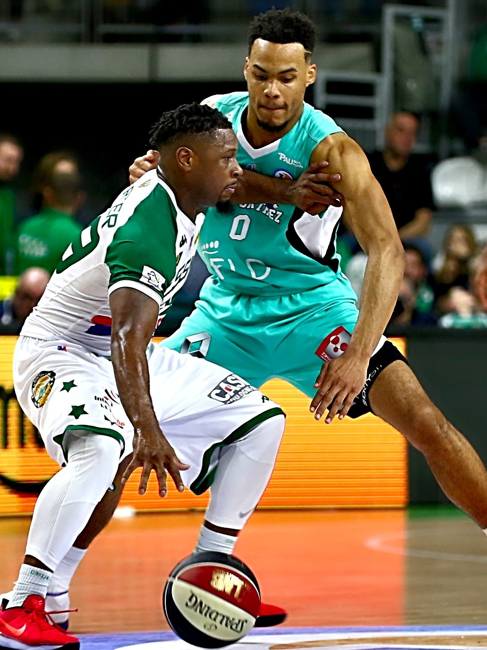 6Q3A1476